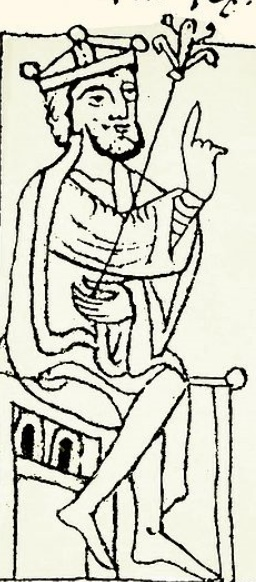 Ramiro I. Miniatura del siglo XIII de Jaca. (Huesca, Aragón, España)